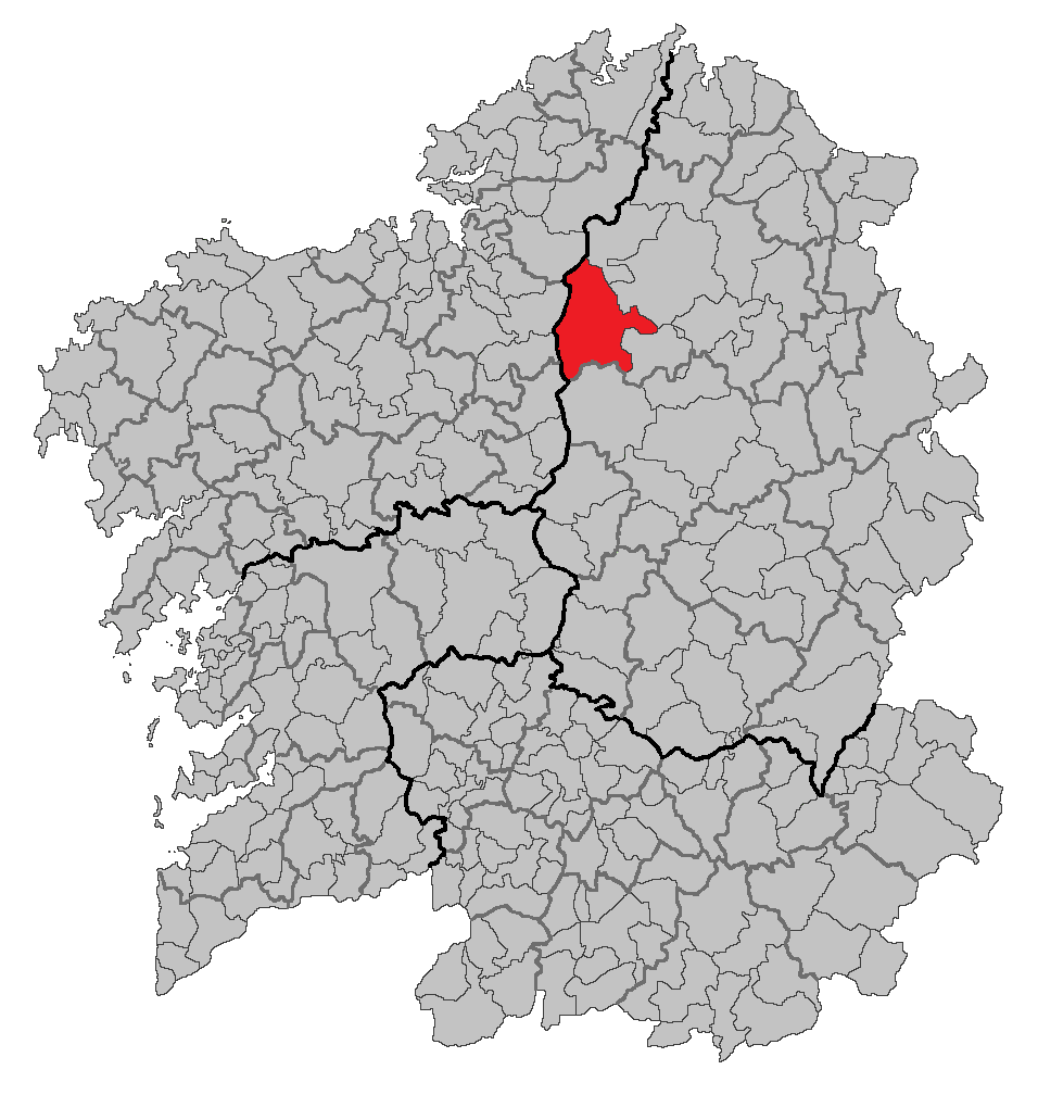 Mapa coa localización do concello de Guitiriz.